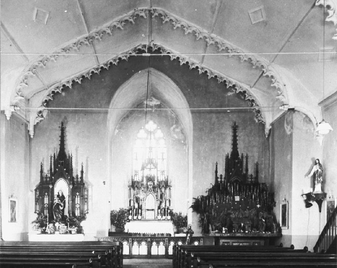 Katholische Pfarrkirche St. Cornelius und Cyprian in Heilbronn-Biberach, Entwurf Christian Friedrich von Leins (1814-1892) württembergischer Hofbaumeister, Einweihung 11. Oktober 1863, Abbruch 1984